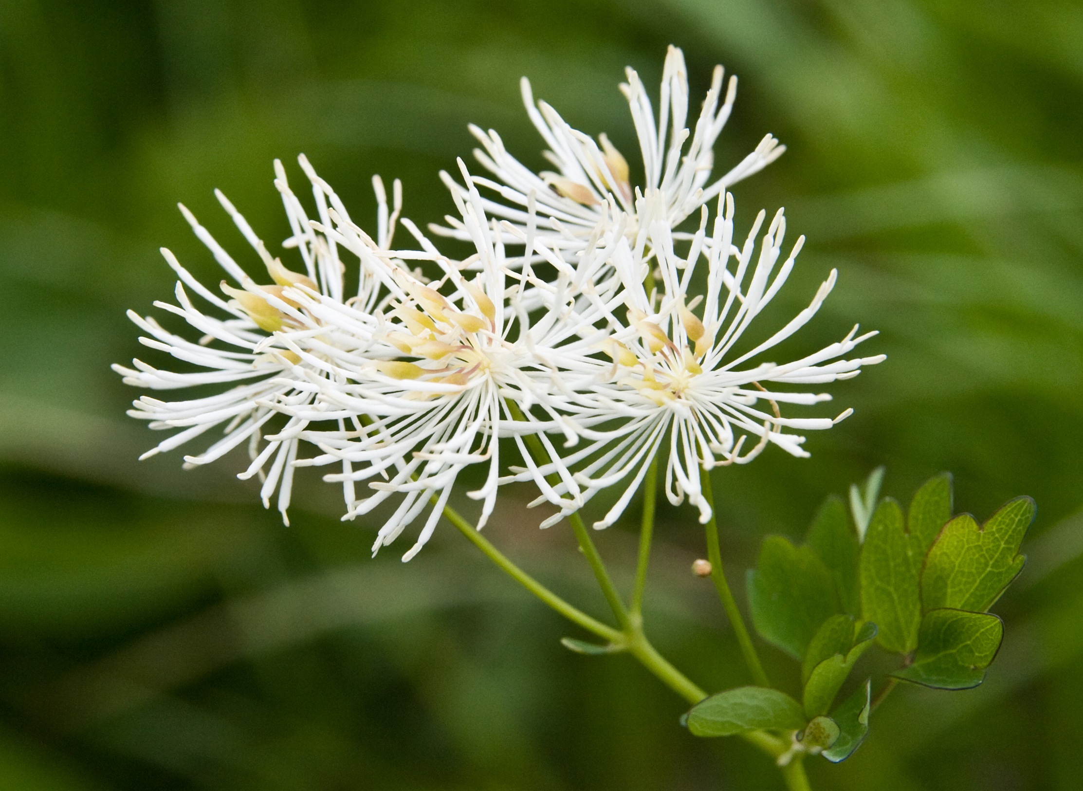 カラマツソウ (学名:Thalictrum aquilegiifolium var. intermedium)